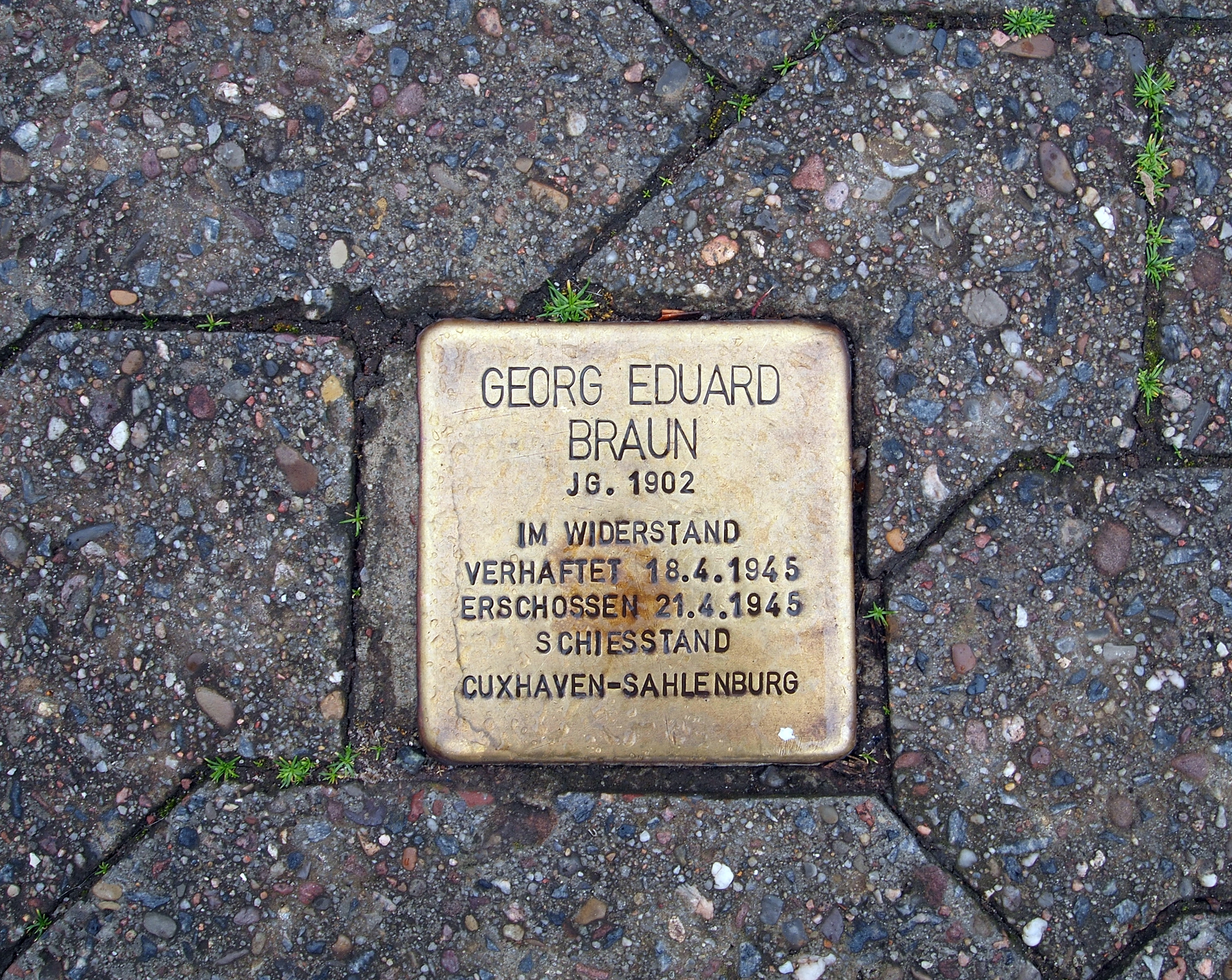 Stolperstein auf Helgoland für Georg Eduard Braun, Kirchstraße, Ecke Lummenstraße (am Friedhof), Oberland